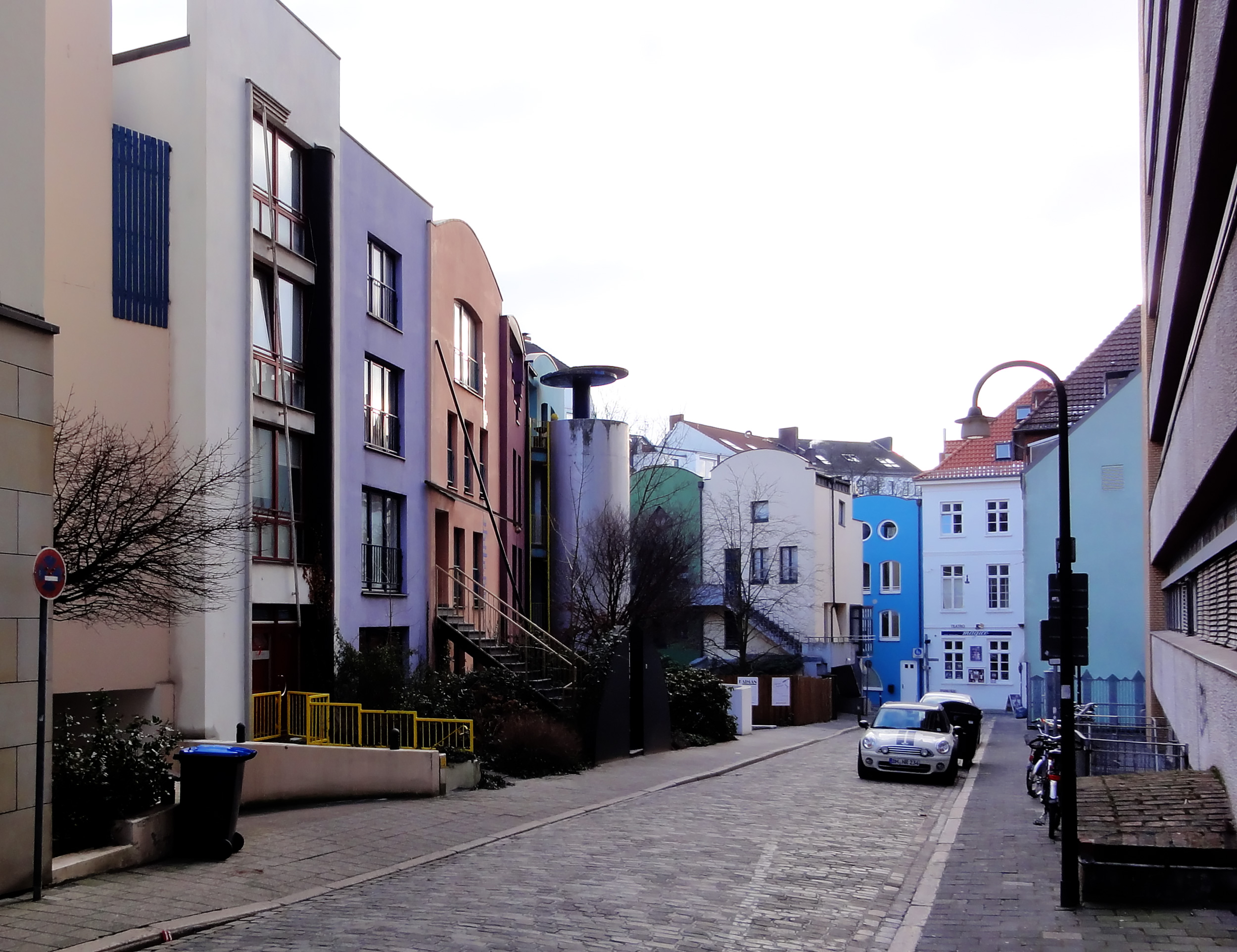 Schnoor - Bremen, Komturstraße